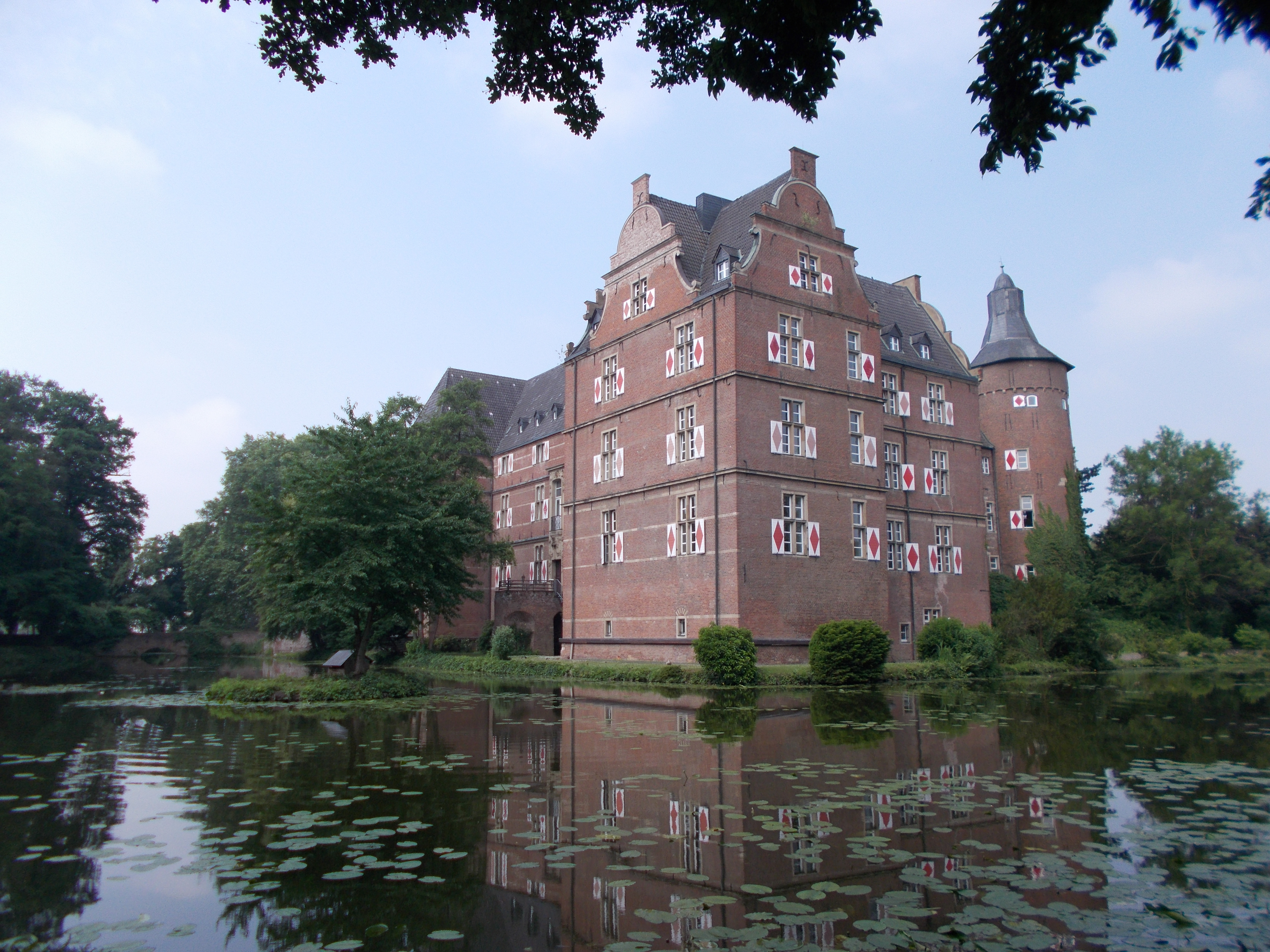 Schloss Bedburg mit Teich.